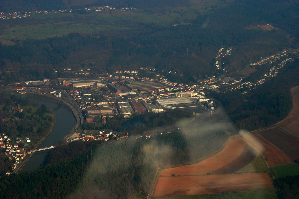 Fotoflug Saarland